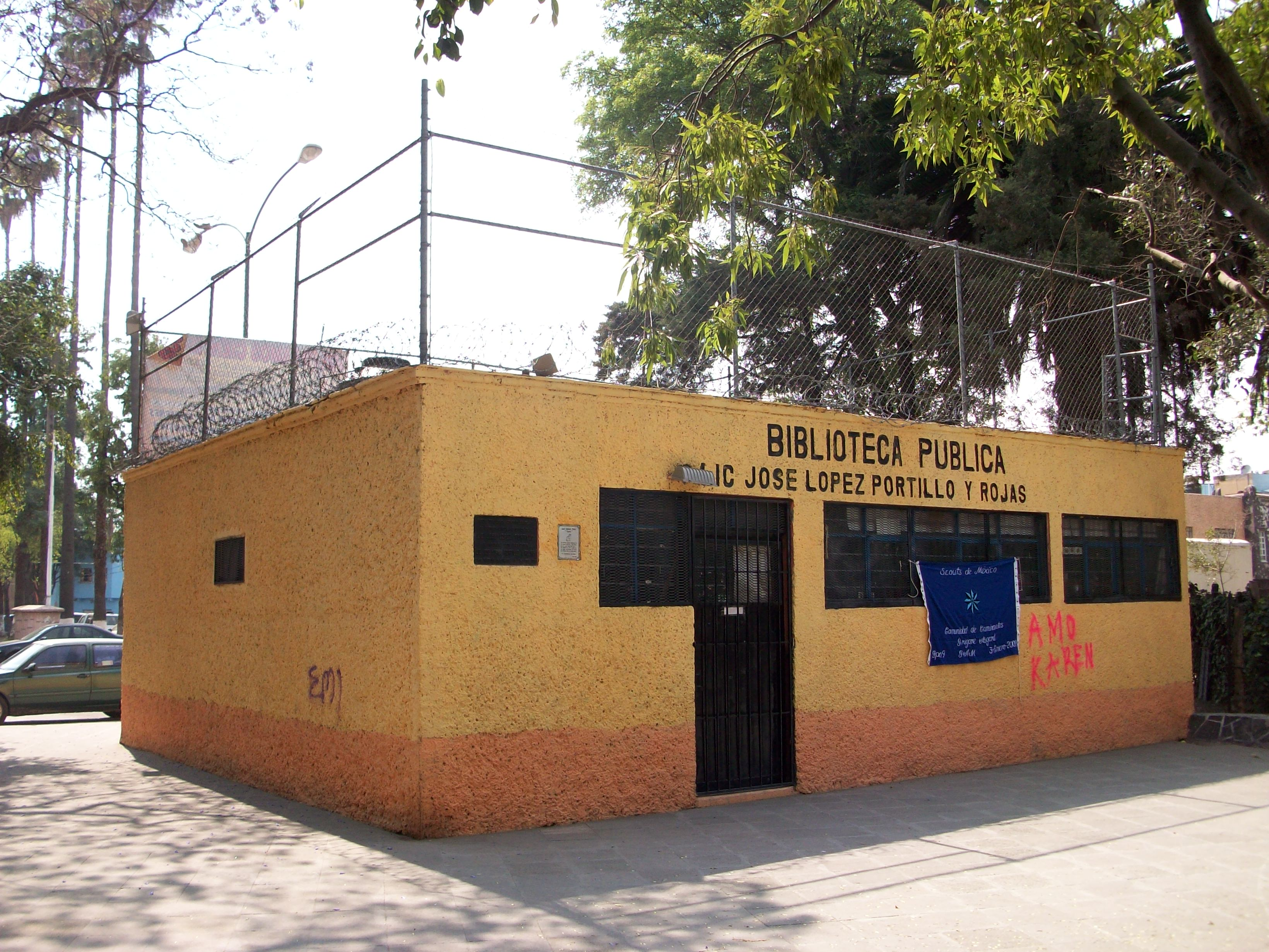 Biblioteca en la colonia Industrial